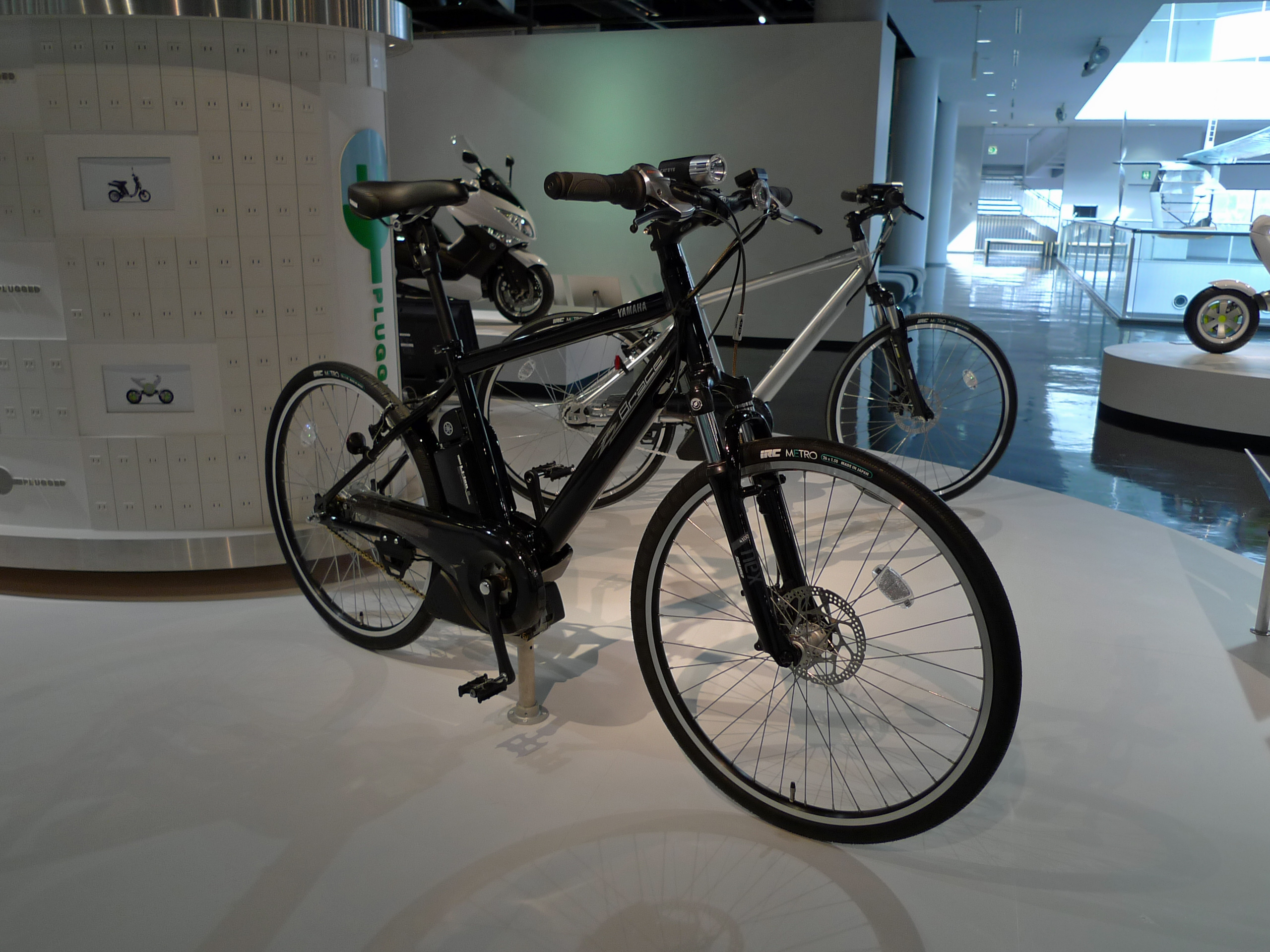 YAMAHA PAS Brace-L Special（ヤマハの市販スポーツタイプ電動自転車） ヤマハコミュニケーションプラザにて撮影